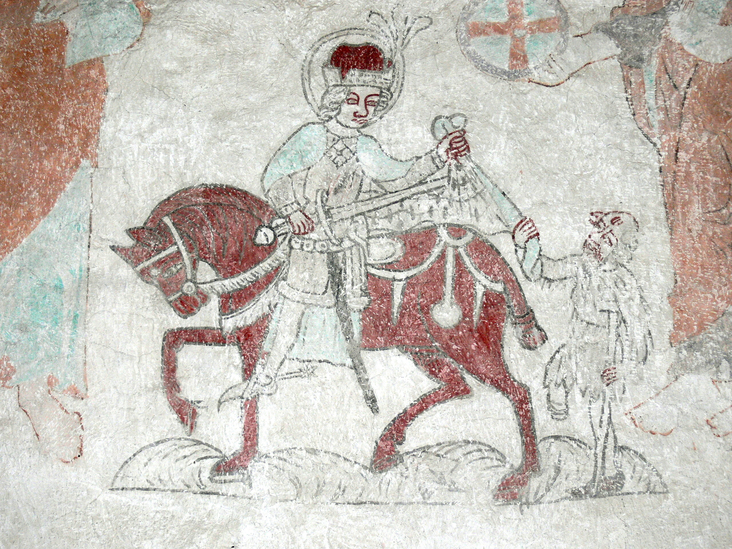 Hejdeby kyrka auf Gotland. Gotische Wandmalerei - St.Martin